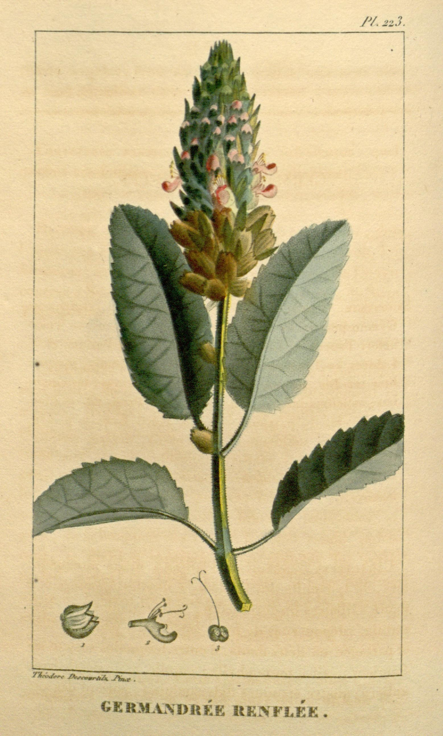 ^^«^ ^«w««hi V)«.r CERM.VXDnÉE RENFLEE .